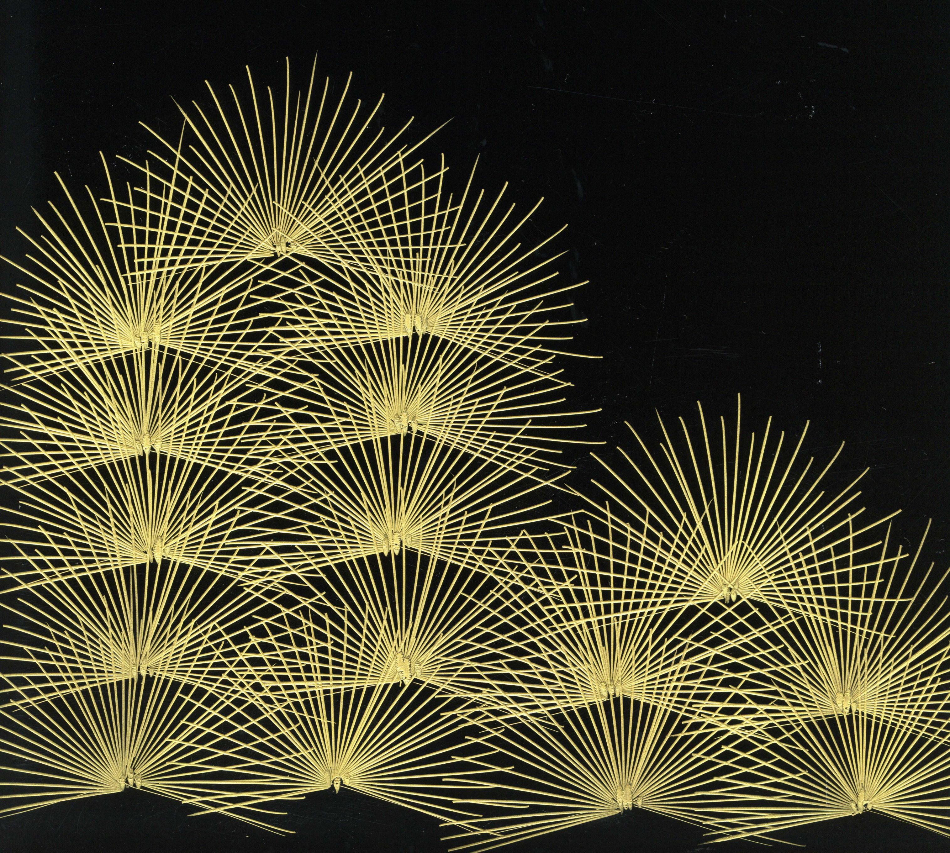 沈金